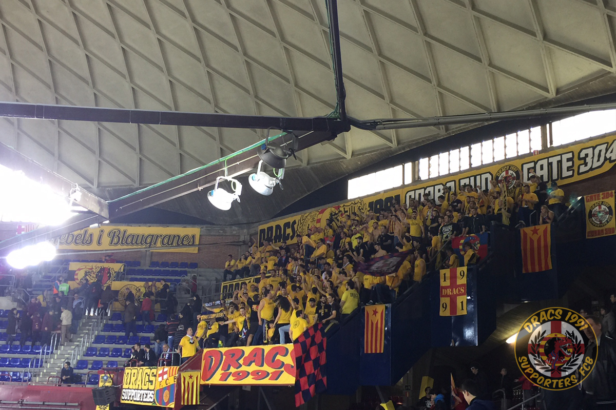 FCB-Estudiantes